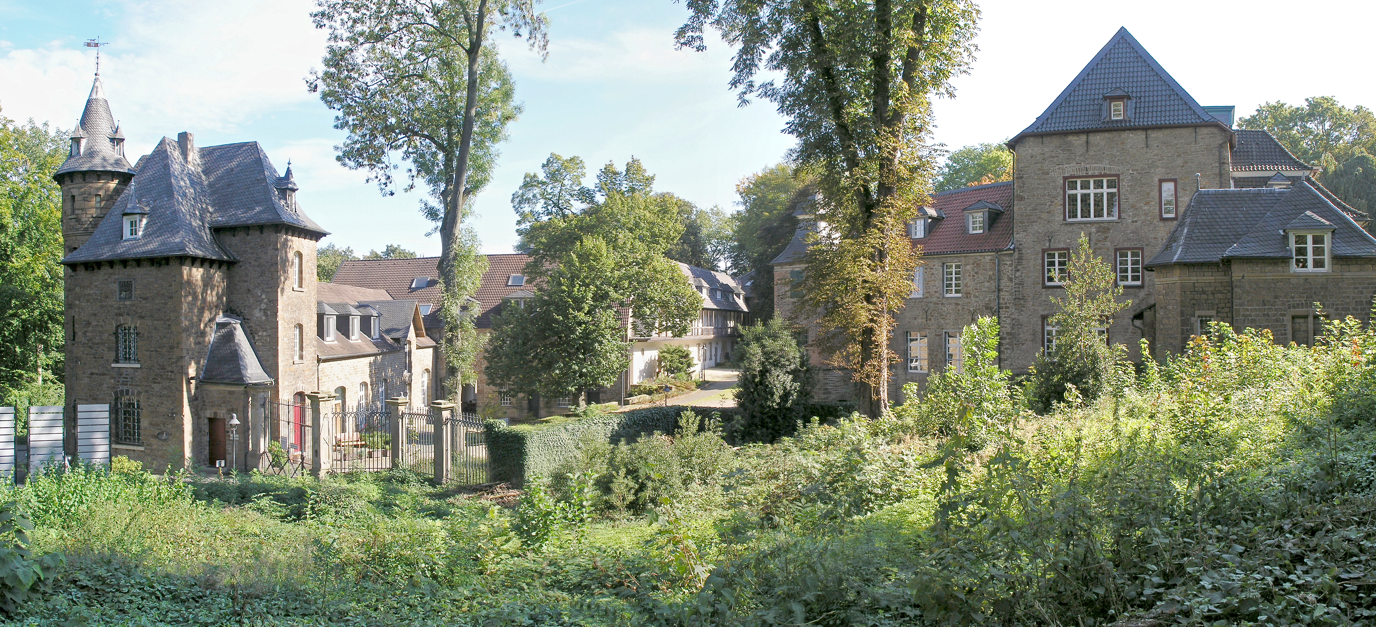 Schloss Schellenberg in Essen-Schellenberg, Ansicht von Westen